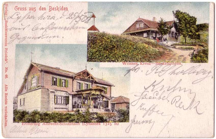 Stara pocztówka wydana przez Beskidenverein